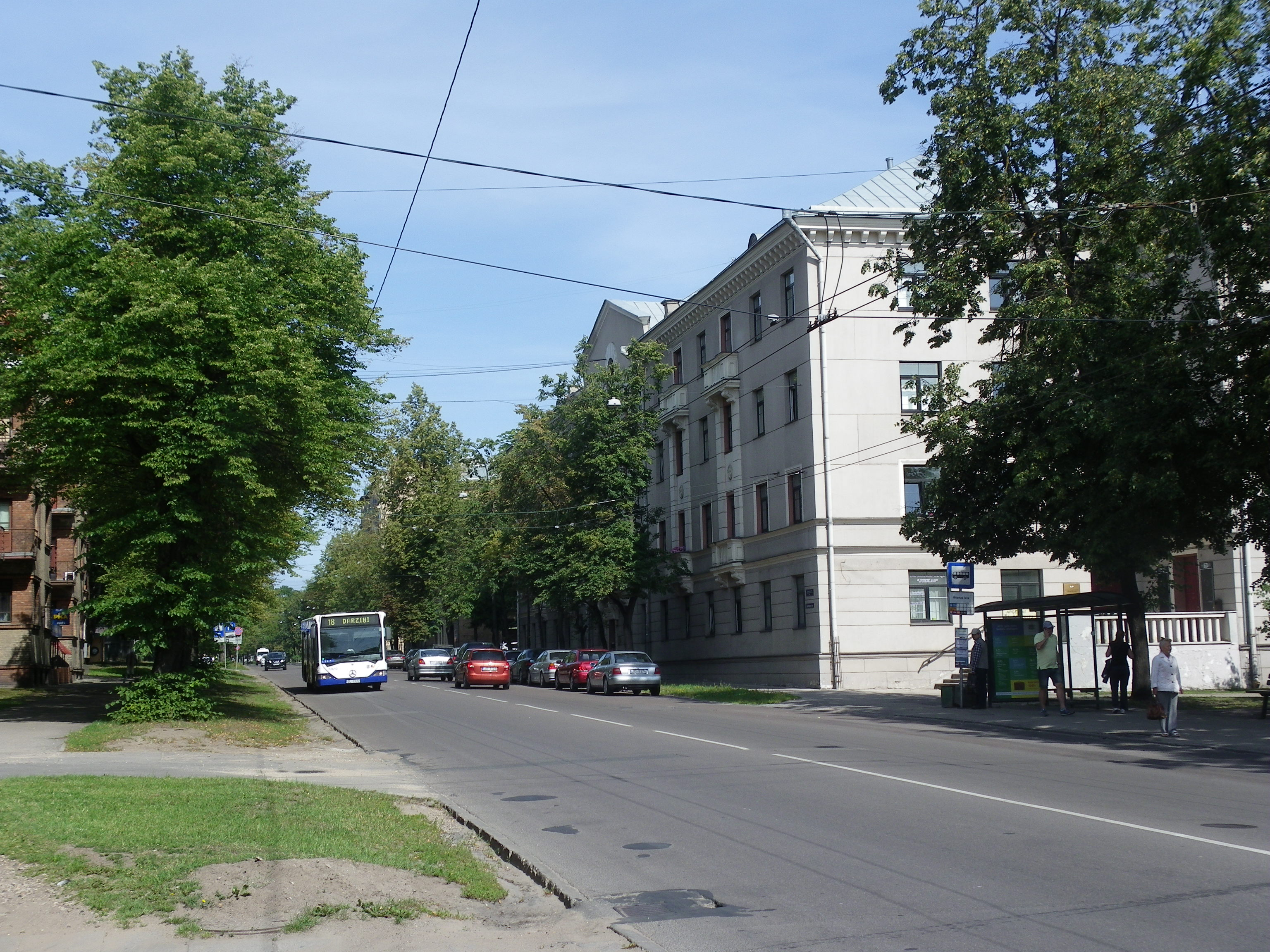 Rīga, Lomonosova iela 9